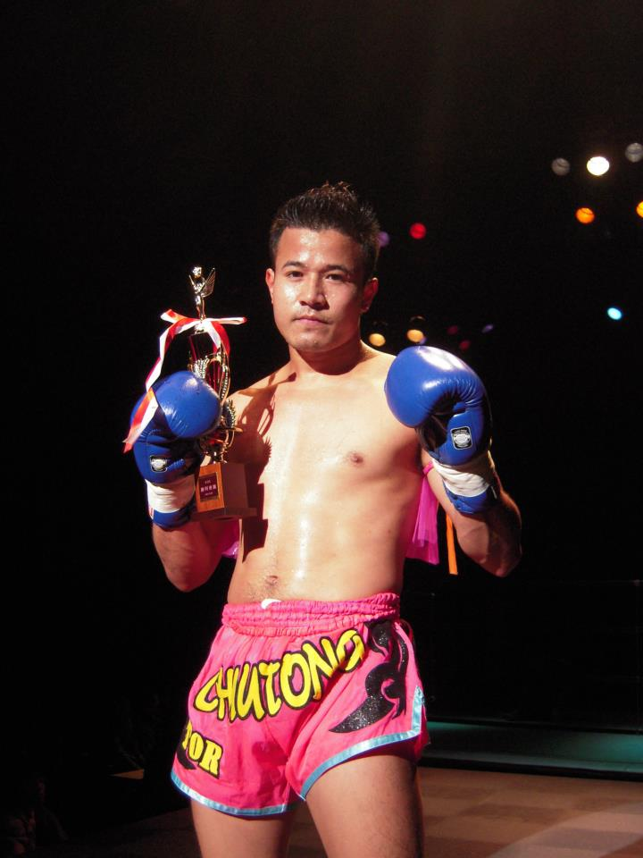 チュートンウィラサクレック